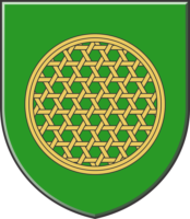 Wappen von Sodražica Slowenien